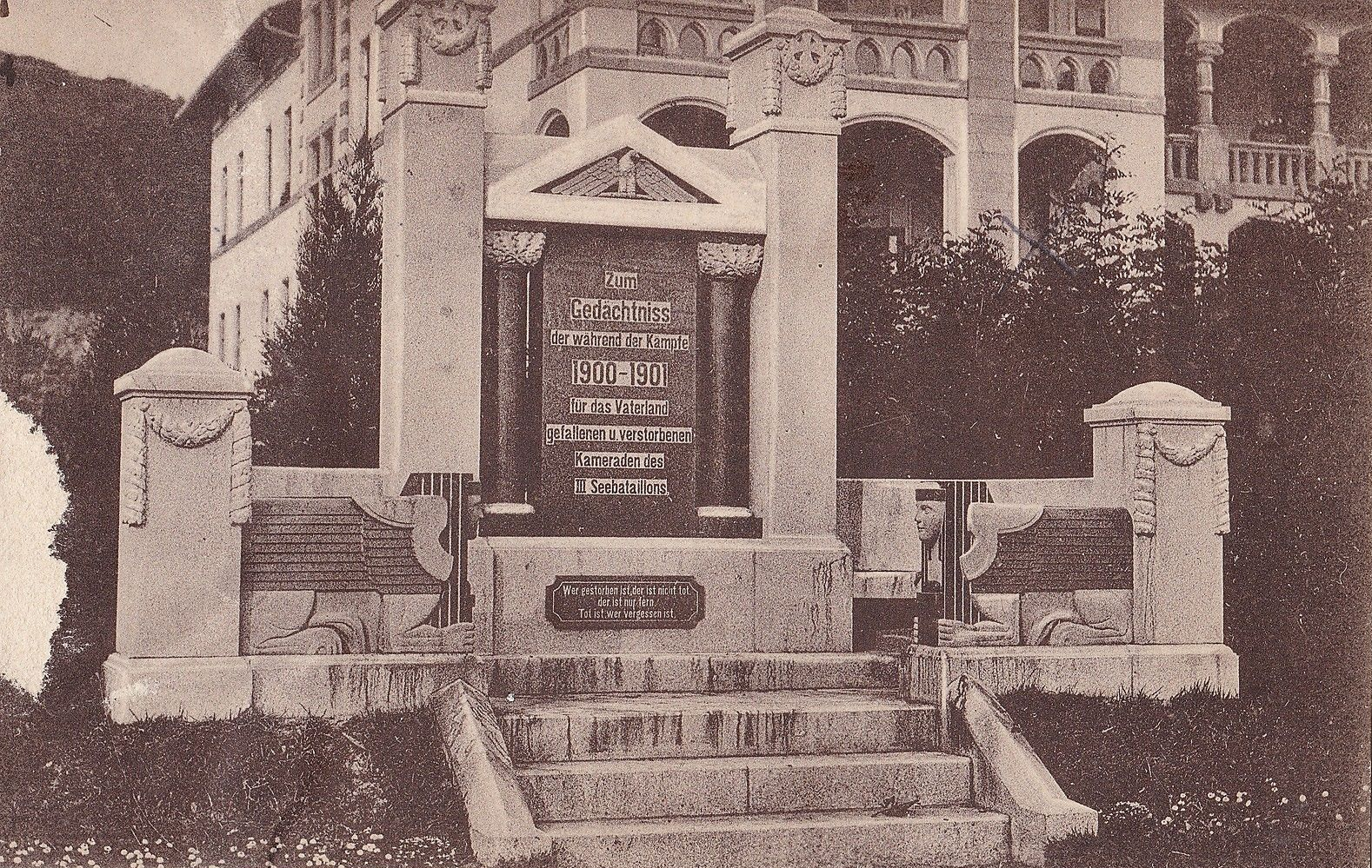 青岛俾斯麦兵营，海军第三营阵亡官兵纪念碑